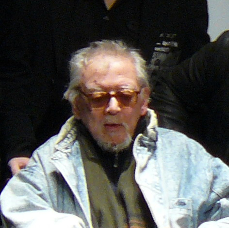 Jess Franco aux Fantastic'Arts 2008